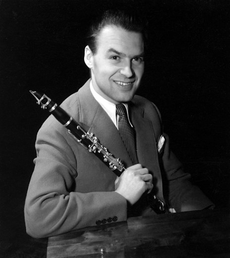 Putte Wickman, 10 september 1924 – 14 februari 2006